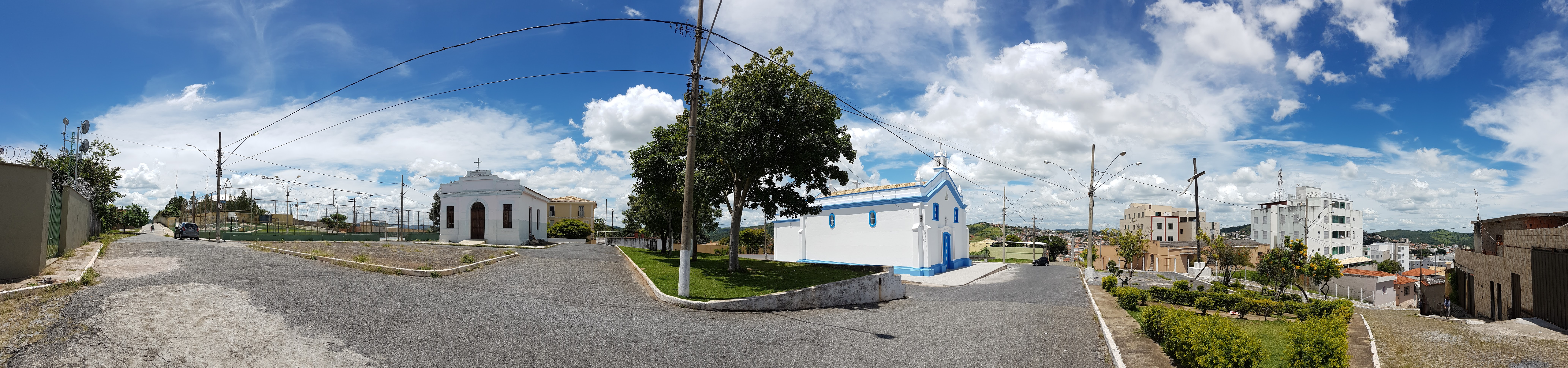 Vista panorâmica do Morro do Rosário, com a igreja dos negros à esquerda, Igreja de Nossa Senhora do Rosário ao centro e cruzeiro à direita.